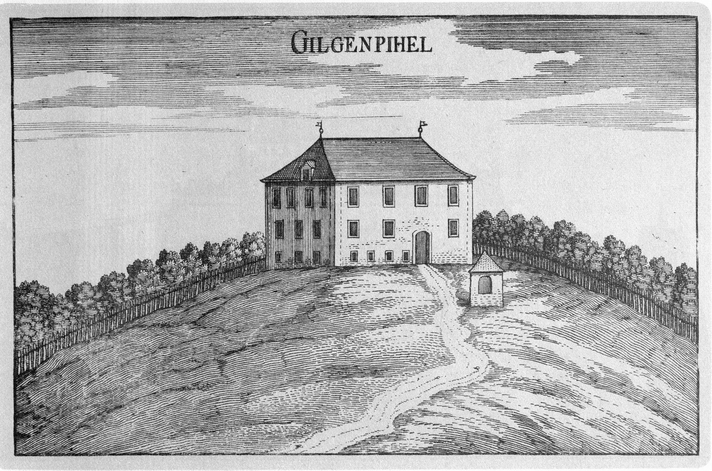 G. M. Vischers Käyserlichen Geographi, Topographia Ducatus Stiriae, Das ist: Eigentliche Delineation / und Abbildung aller Städte / Schlösser / Marcktfleck / Lustgärten / Probsteyen / Stiffter / Clöster und Kirchen / so es sich im Herzogthumb Steyrmarck befinden; Und anjetzo Umb einen billichen Preyß zu finden seynd Bey Johann Bitsch Universitäts Buchhandlern / Auff dem Juden=Platz bey der guldenen Saulen. Graz 1681 Die Nummerierung der Dateien folgt der alphabetischen Reihung der Ortsnamen